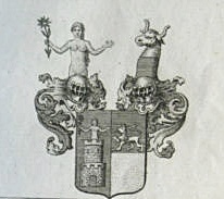 Wappen der Freiherrn von von Fürstenwärther auf Kellenbach (aus dem Haus Wittelsbach stammend).Das Fürstenwärther-Stammwappen ist das linke, mit Turm und Jungfrau